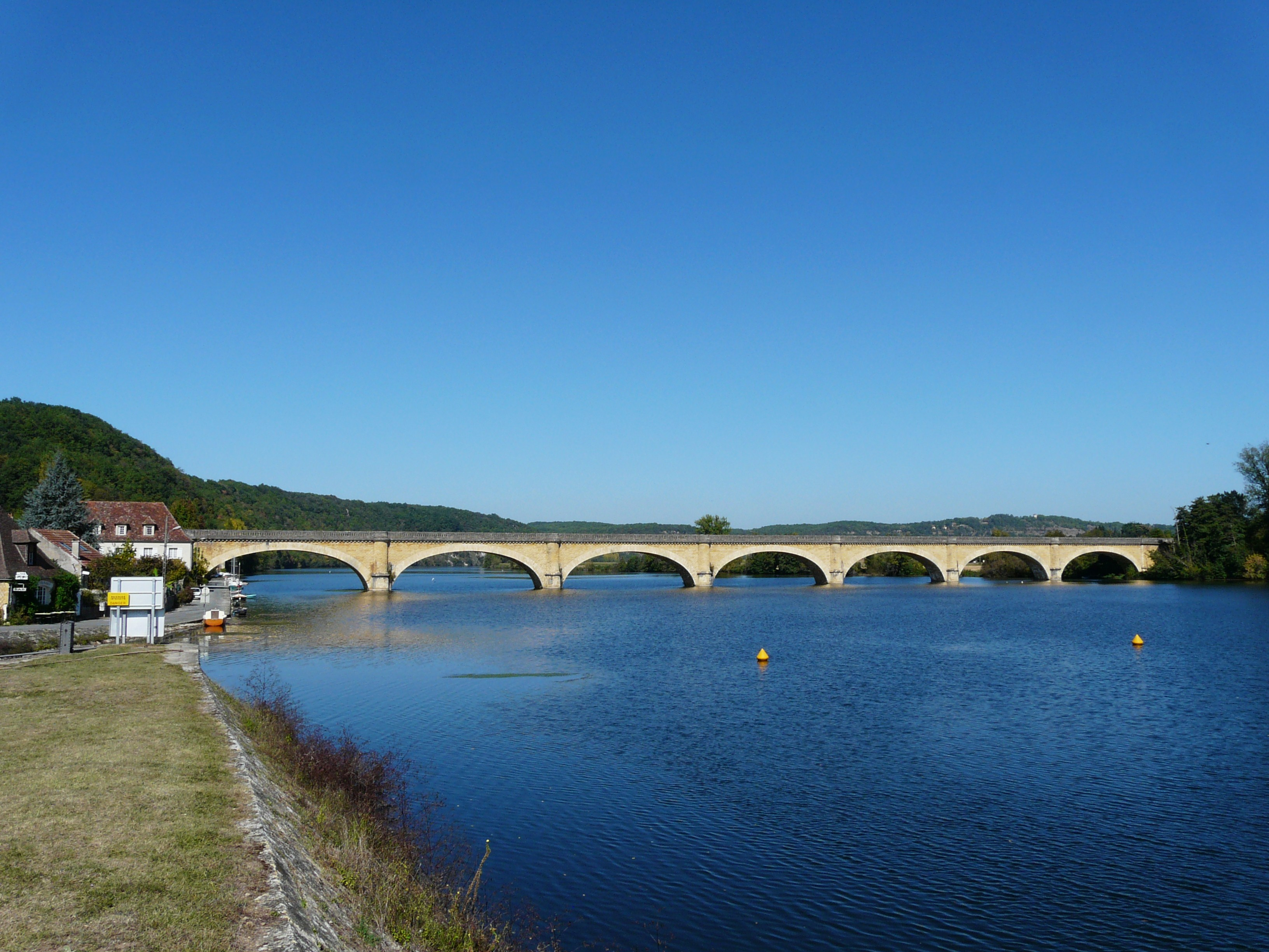 Le pont de Mauzac au-dessus de la retenue du barrage de Mauzac, entre Mauzac-et-Grand-Castang à gauche et Calès à droite, Dordogne, France.